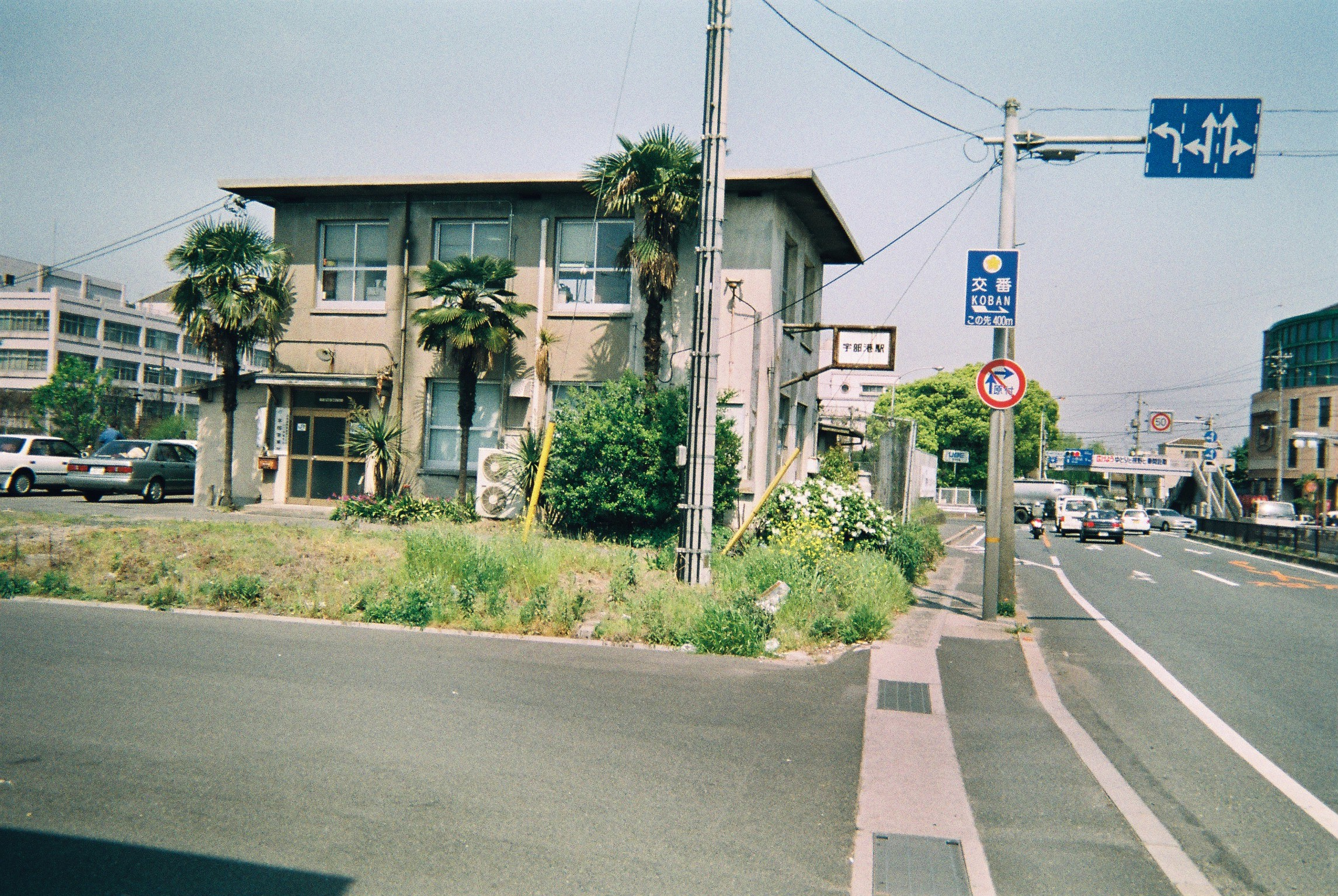 宇部港駅駅舎（1999年）